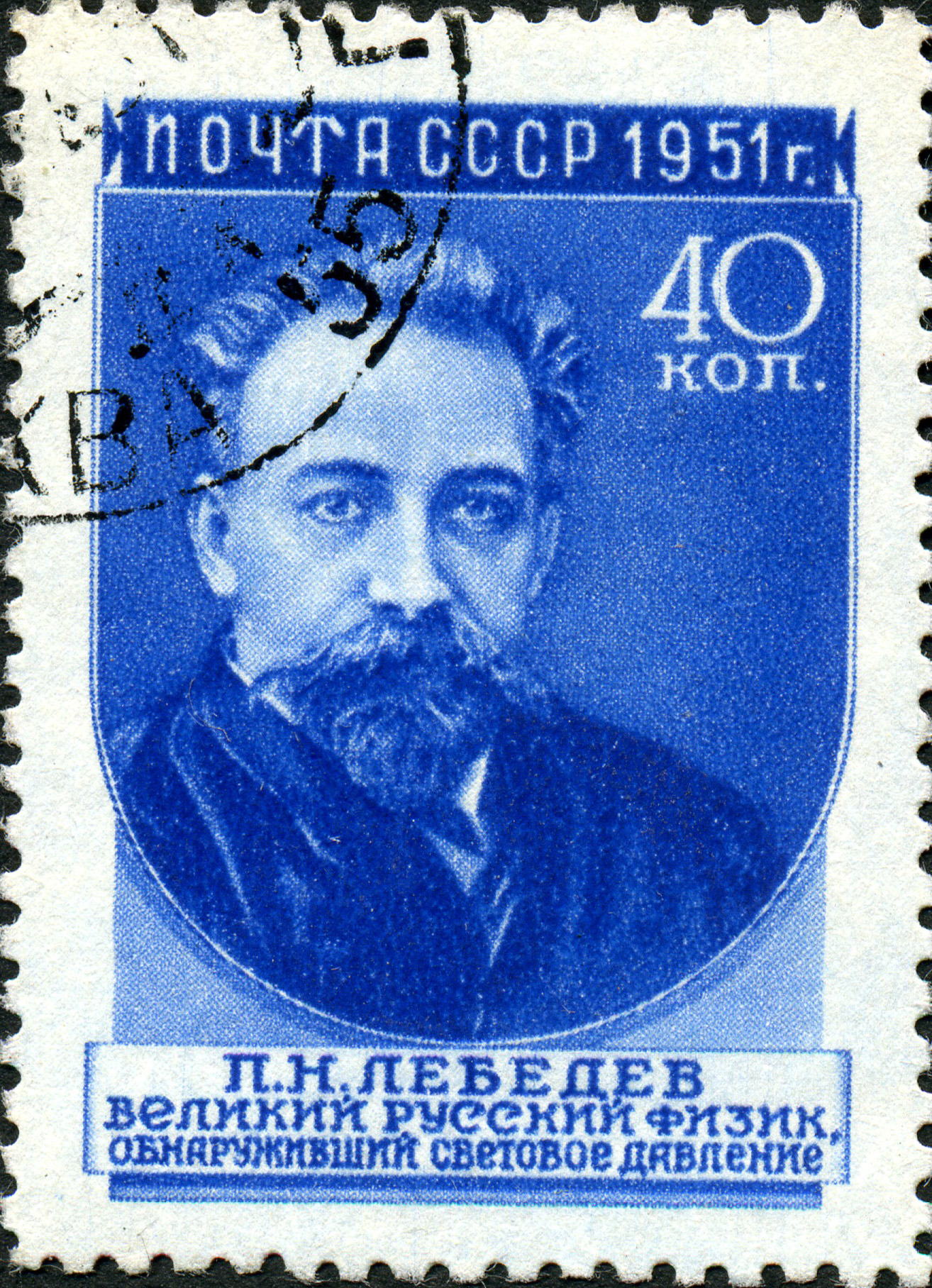 Марка СССР